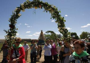 Romería del último domingo de mayo en Huerga de Garaballes.